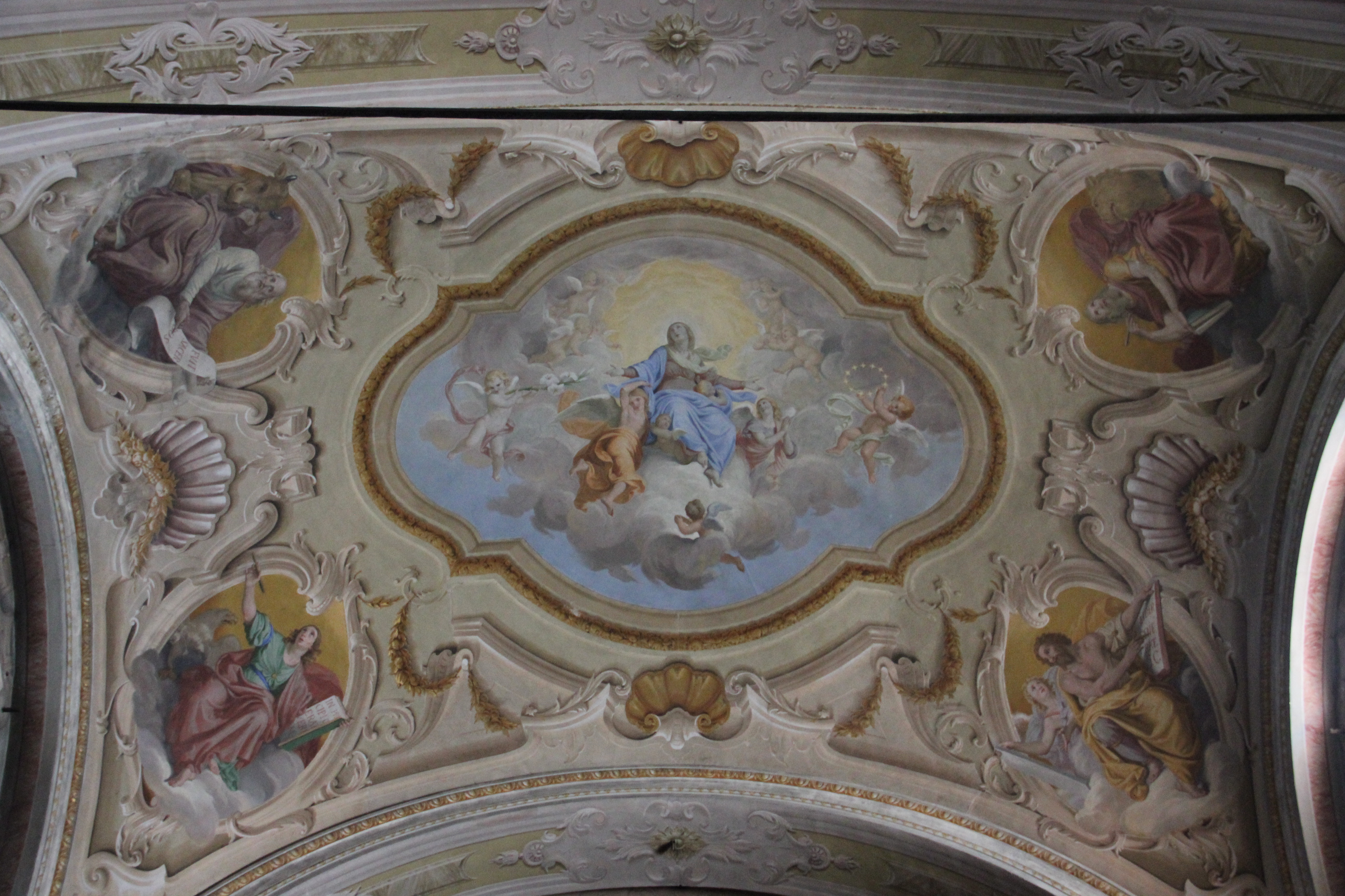 Chiesa arcipretale plebana di Uggiate